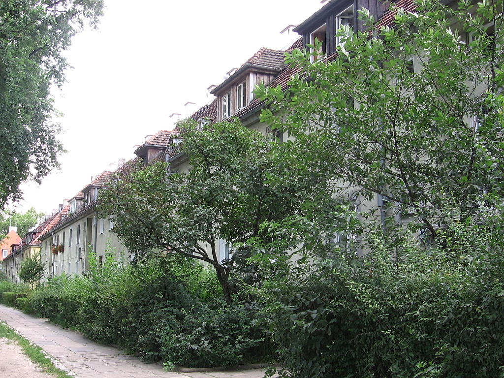 Hutnicza street, settlement Pilczyce, Wrocław, Poland